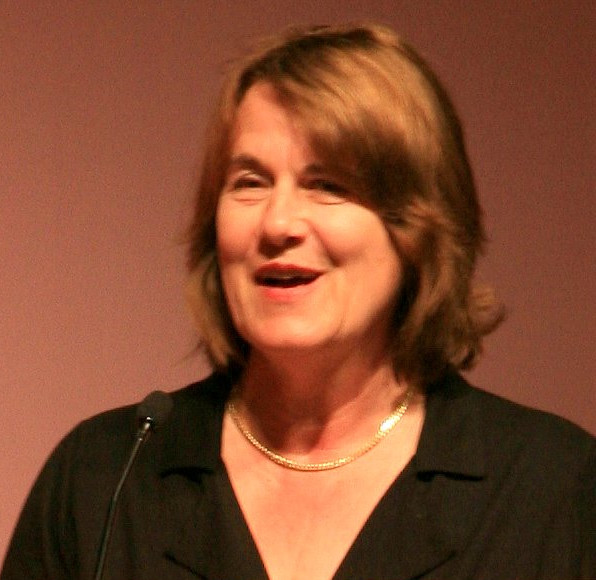 Ute Erdsiek-Rave auf dem Landesparteitag der SPD-Schleswig-Holstein in Lübeck am 1. August 2009